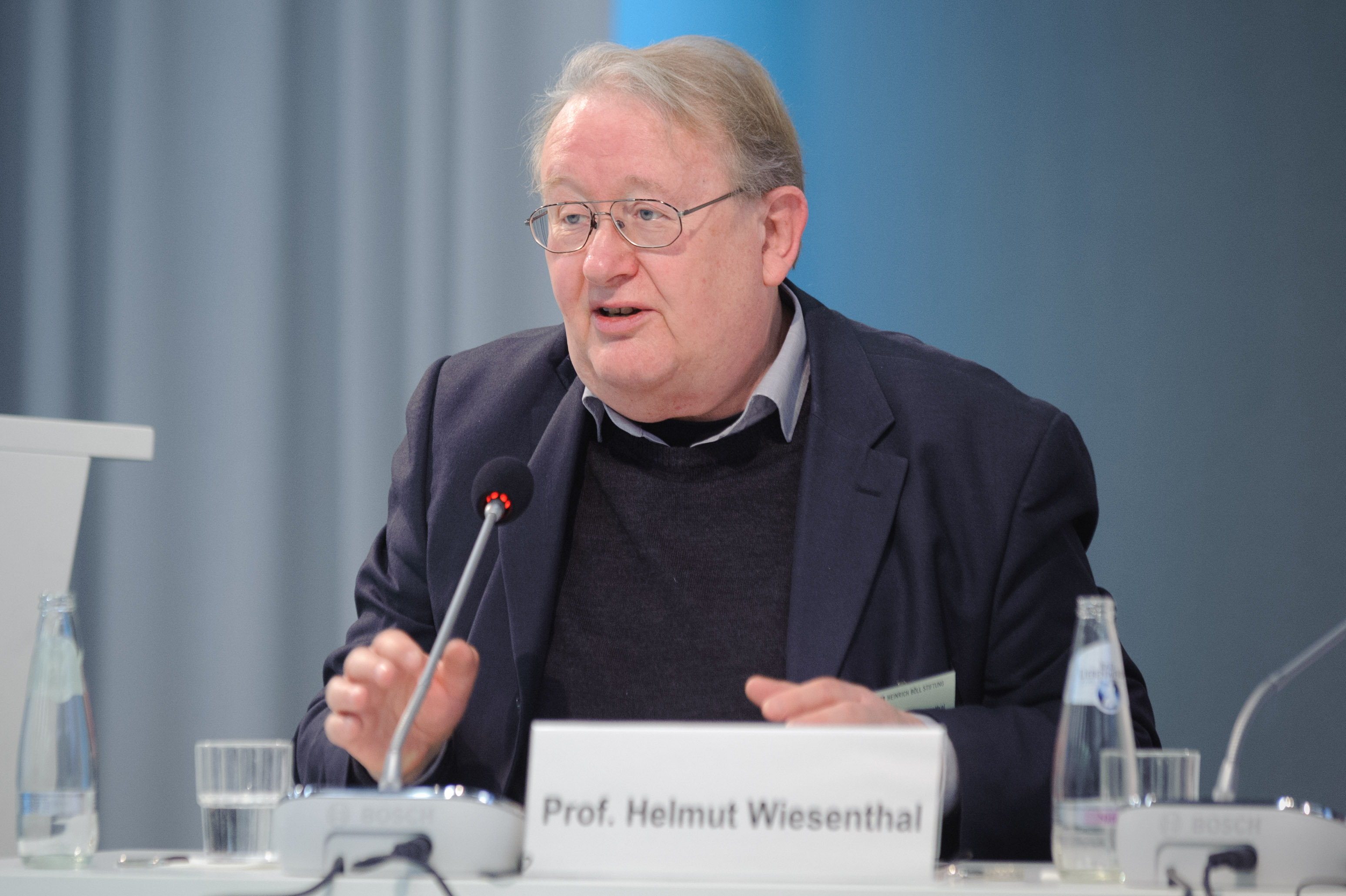 Prof. Dr. em. Helmut Wiesenthal (Politikwissenschaft, Humboldt-Universität zu Berlin) Konferenz: Hellas in der Krise Foto: Stephan Röhl